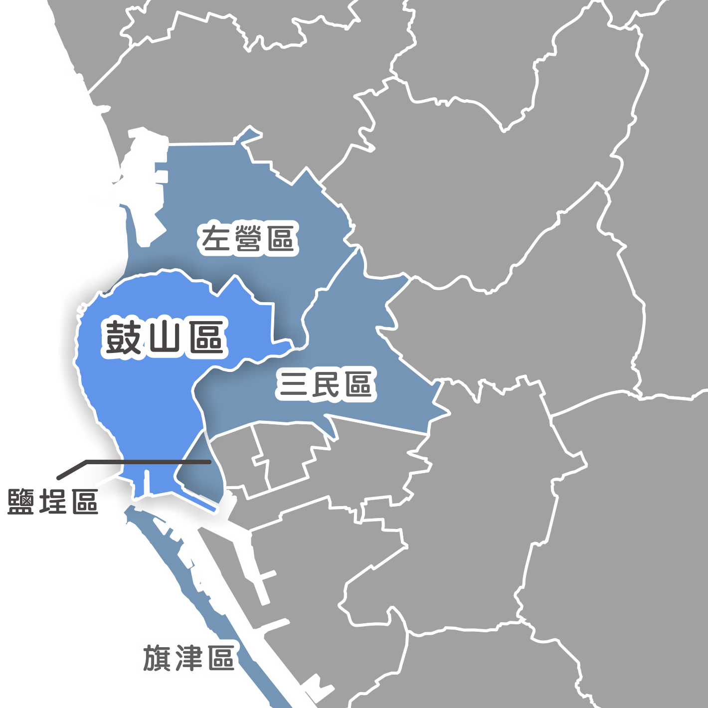 鼓山區相對位置